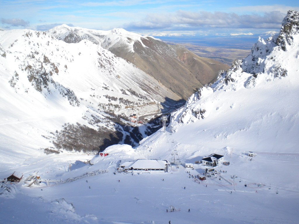 Vista superior final primer tramo aerosilla e inicio segundo tramo de aerosilla del cerro La Hoya, pista de principiantes, confitería y guardería.